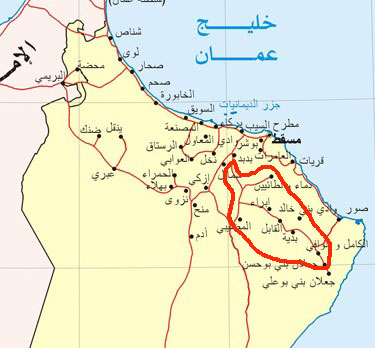 الحدود التقريبية لإمارة الحرث في شرقية عُمان في أواخر عهد الشيح صالح بن علي الحارثي